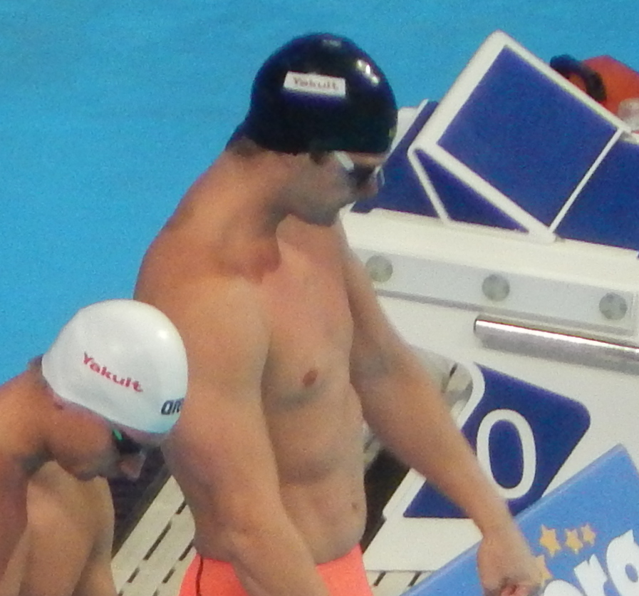 Перед финалом на 200 метров на спине в Казани на чемпионате мира